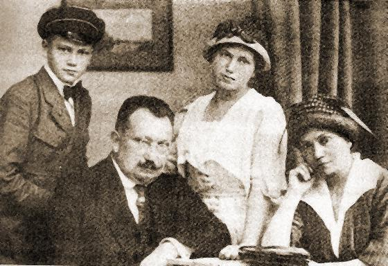 Андрій Лівицький з родиною. 1920 р. Тижневик "Тризуб" - 1937. - № 6 (лютий). - C.14-15.